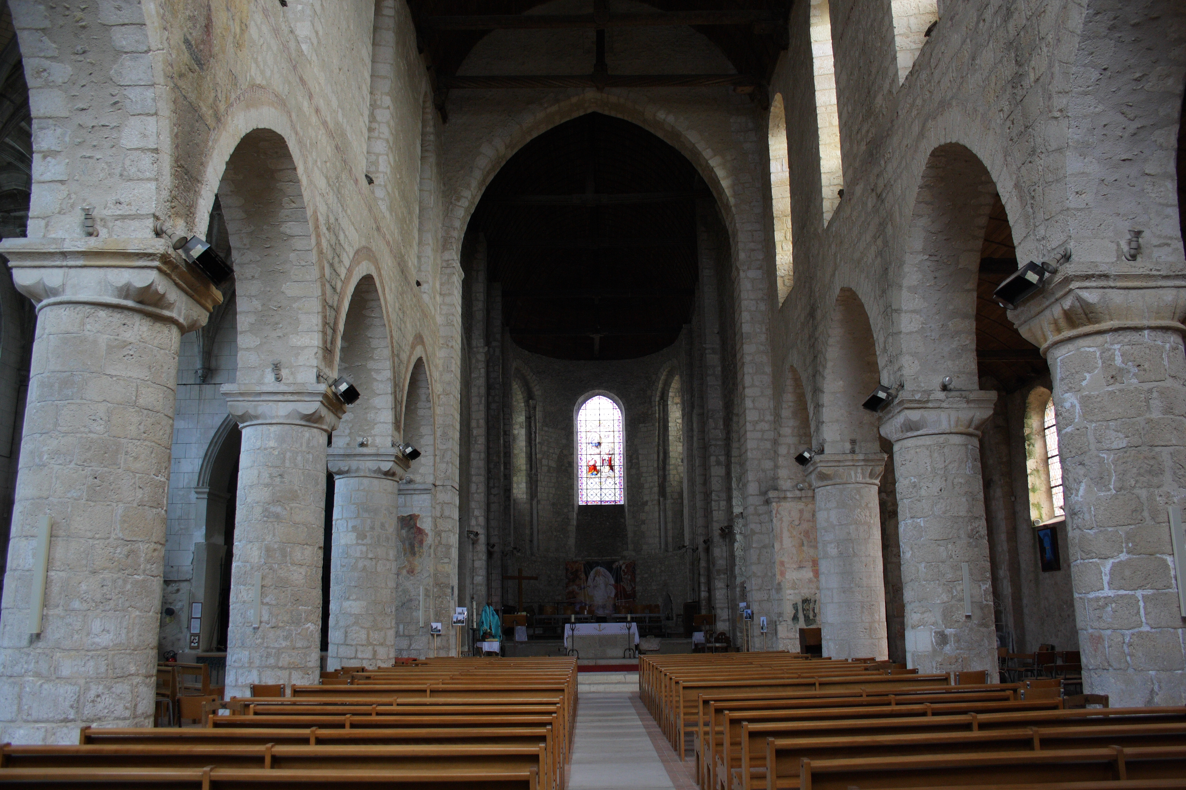 Katholische Pfarrkirche Saint-Nicolas in Saint-Arnoult-en-Yvelines im Département Yvelines in der Region Île-de-France (Frankreich), Innenraum Object location48° 34′ 17.76″ N, 1° 56′ 24.72″ E